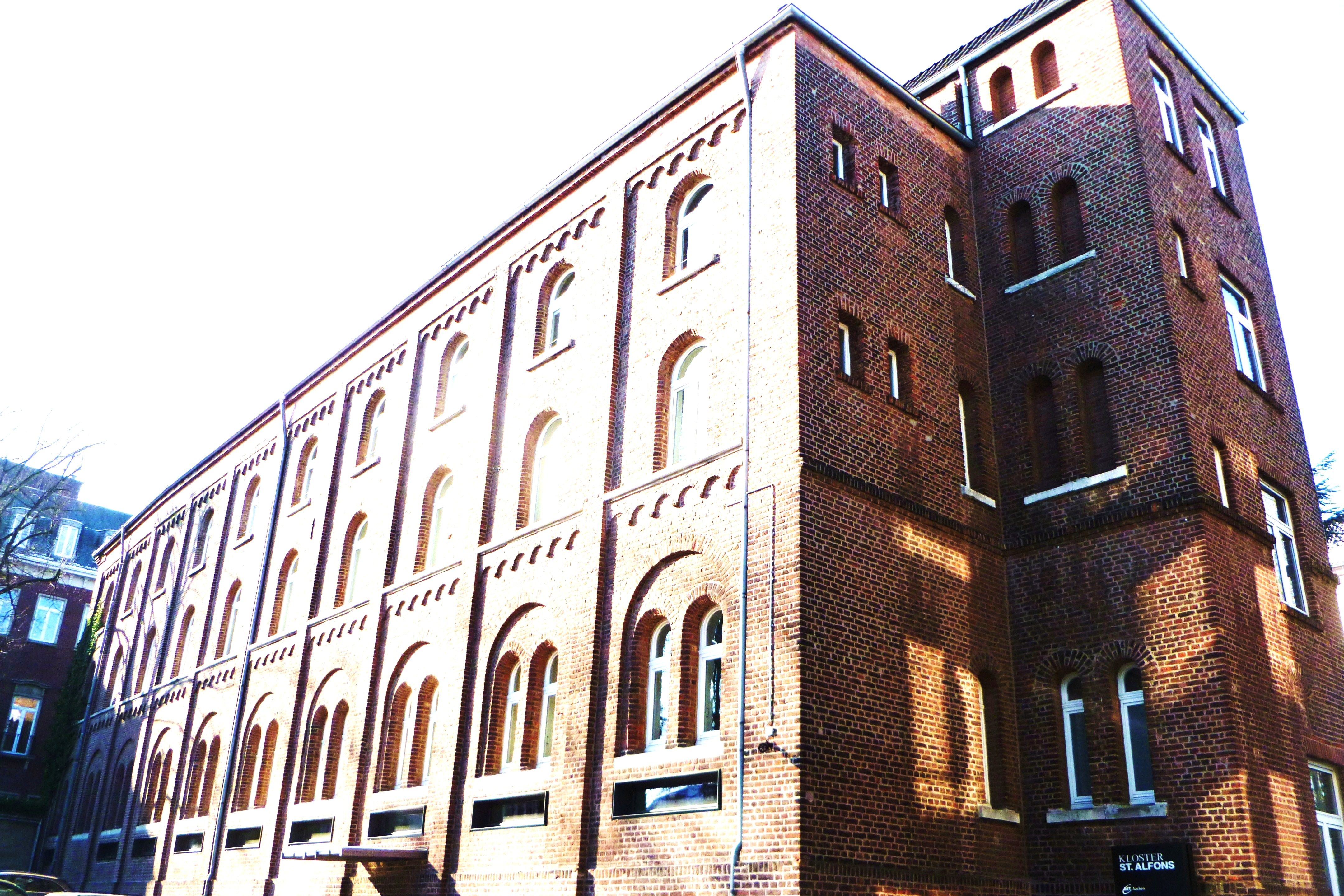 Baudenkmal in Aachen-Frankenberg